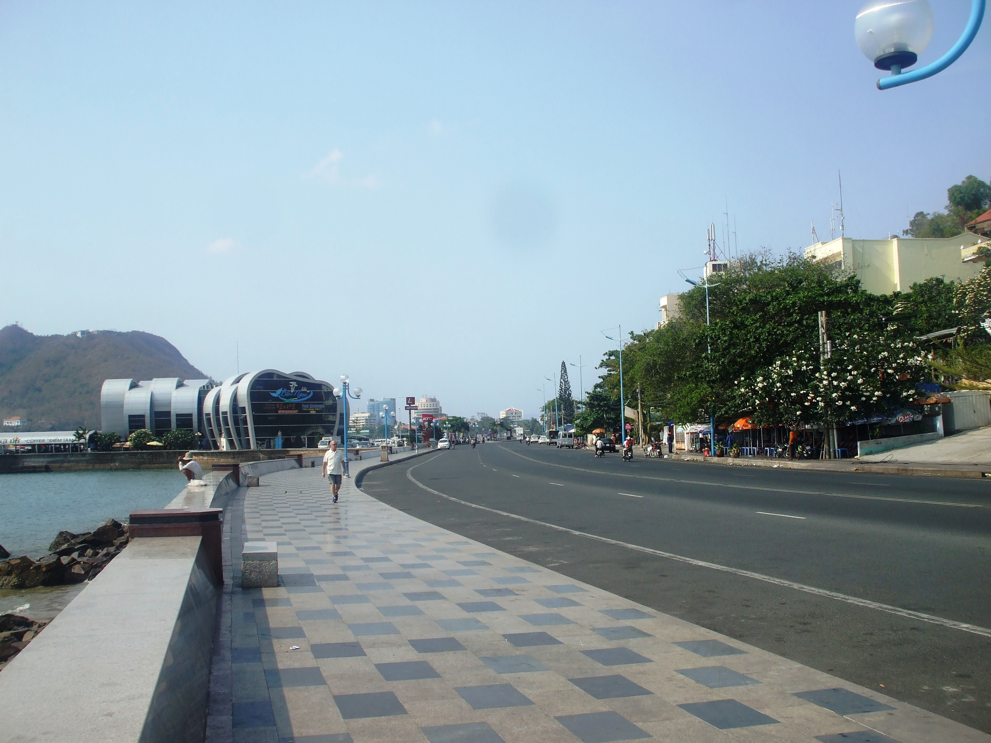 Một con đường lớn ven biển ở Bãi Trước (Vũng Tàu, Việt Nam)